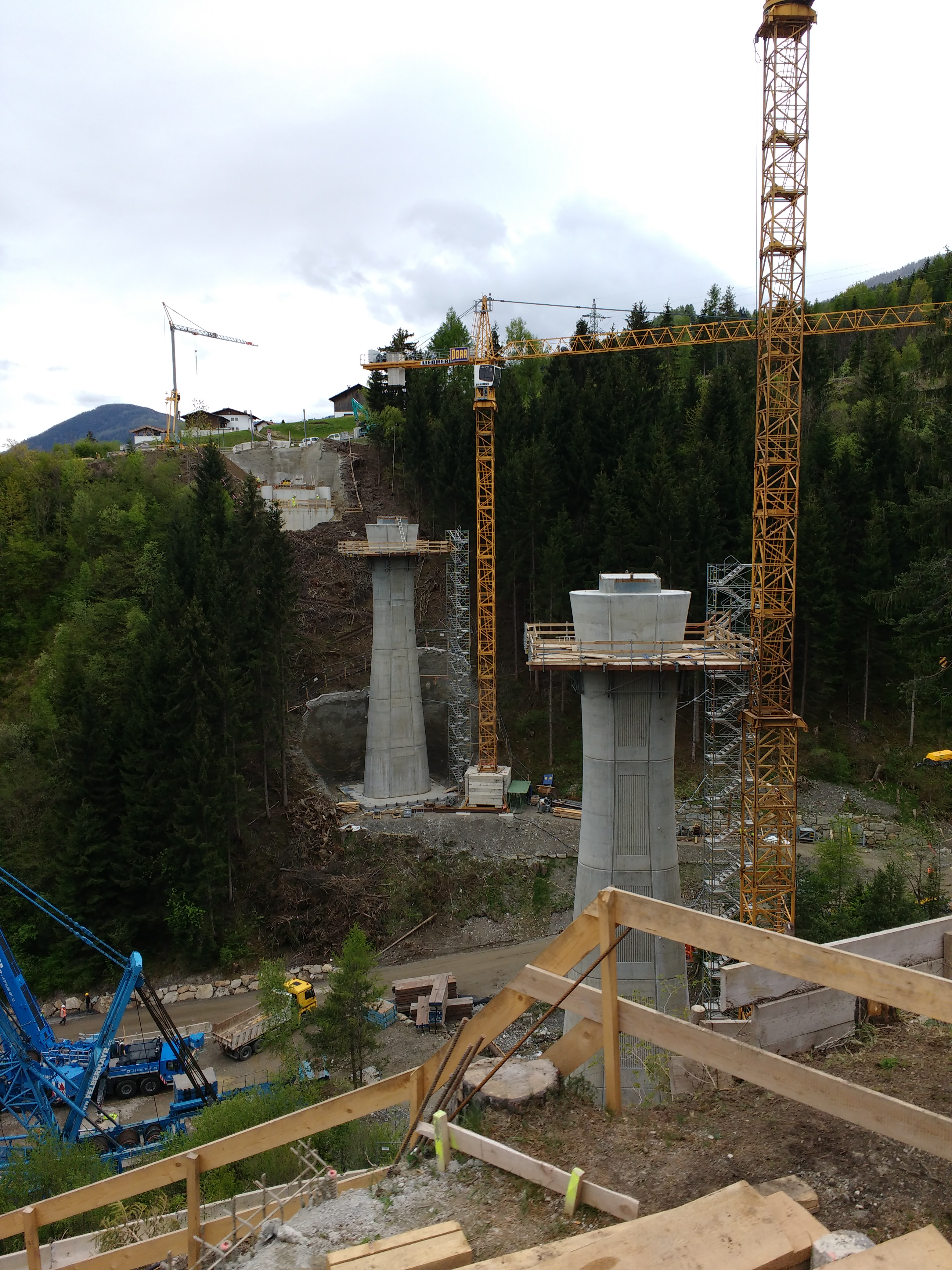 Stubaitalbahn. Mutterer Brücke in Bau